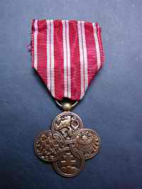 Československý válečný kříž 1918